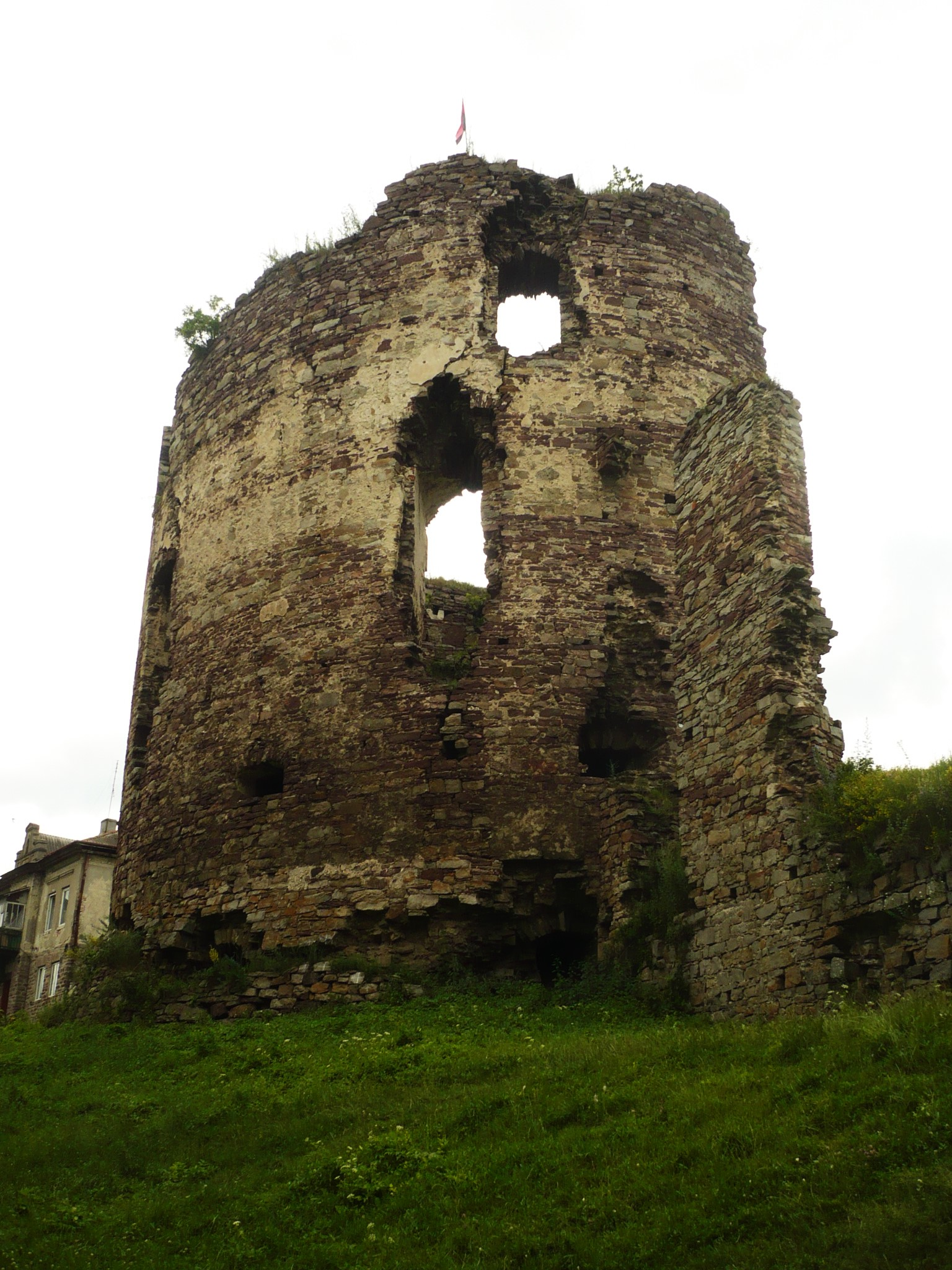 Buczacz. Zamek